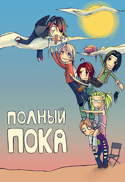 Все персонажи комикса "Полный пока".